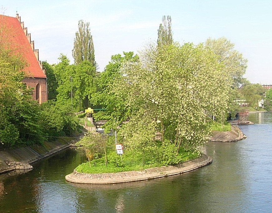 Wyspa św. Barbary w Bydgoszczy